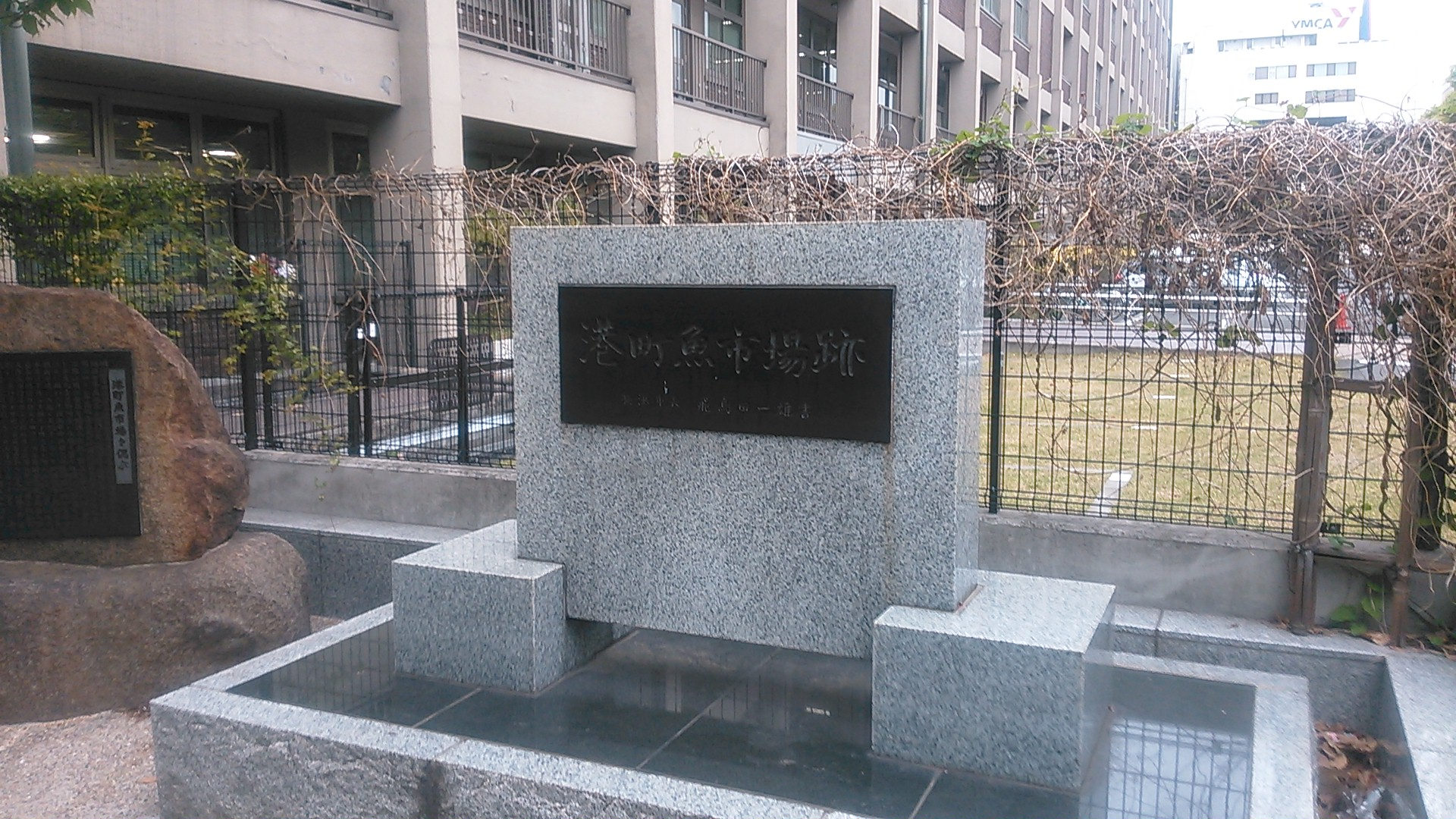 横浜市中区港町、横浜市庁舎の敷地にある「魚市場跡」の碑